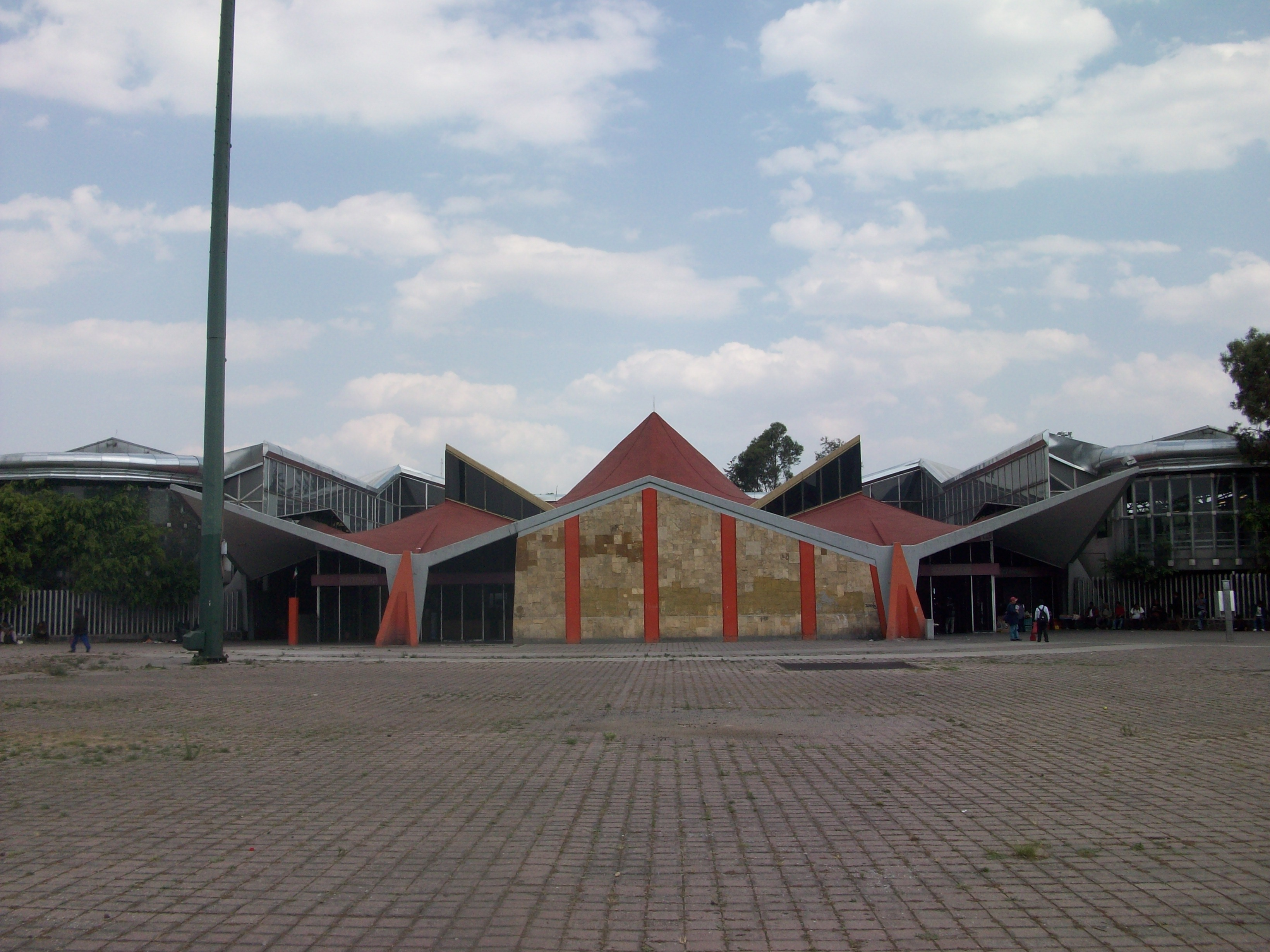 Edificio de la estacion San Lazaro de Felix Candela